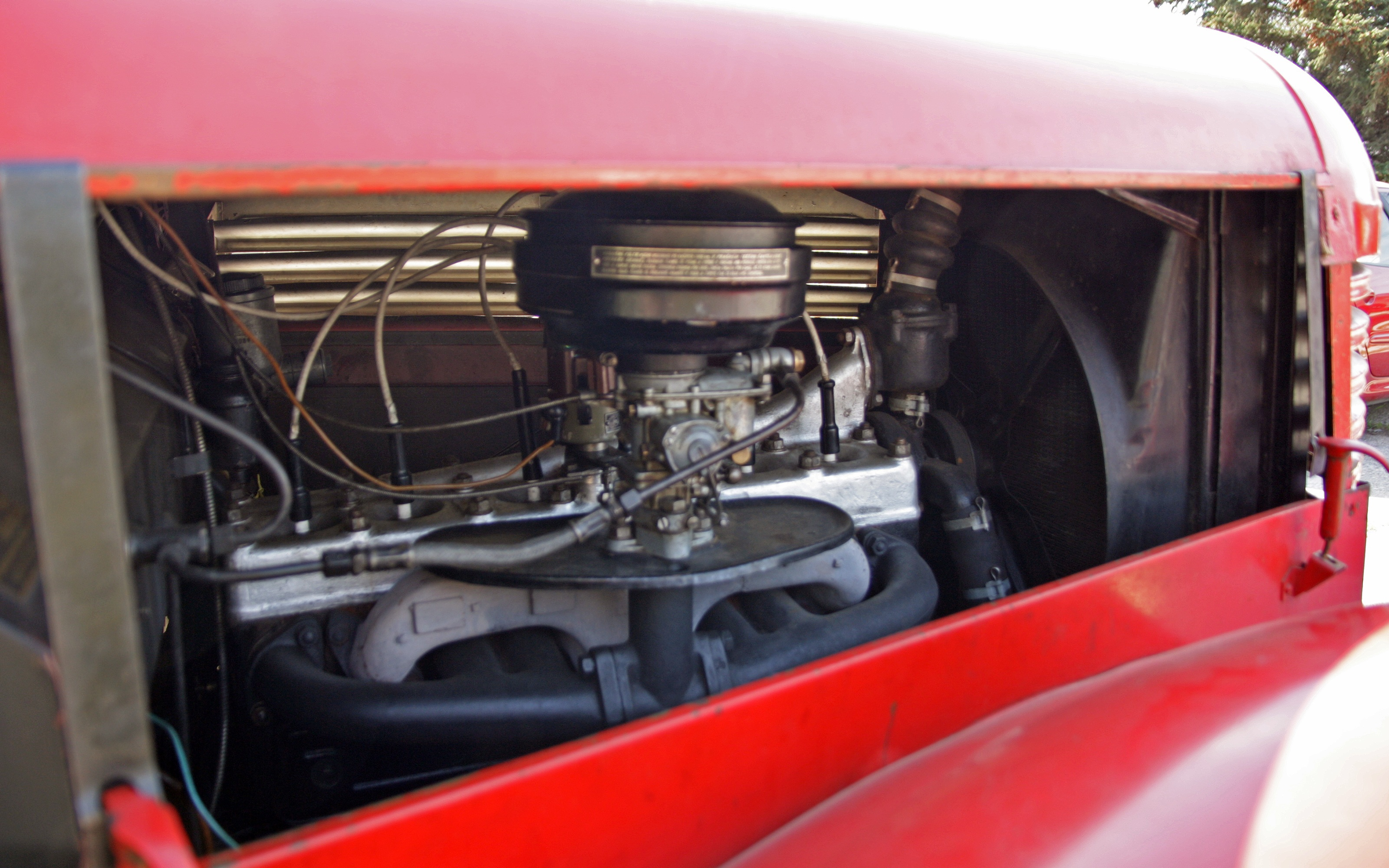 Dopravní vůz Praga RN se skříňovou sanitní nástavbou pro účely civilní obrany. Detail šestiválcového motoru SV.